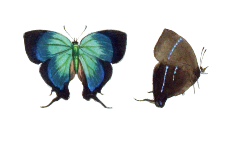 P[seudolycaena] Danaus Felder = Theritas danaus (C. & R.Felder, [1865])